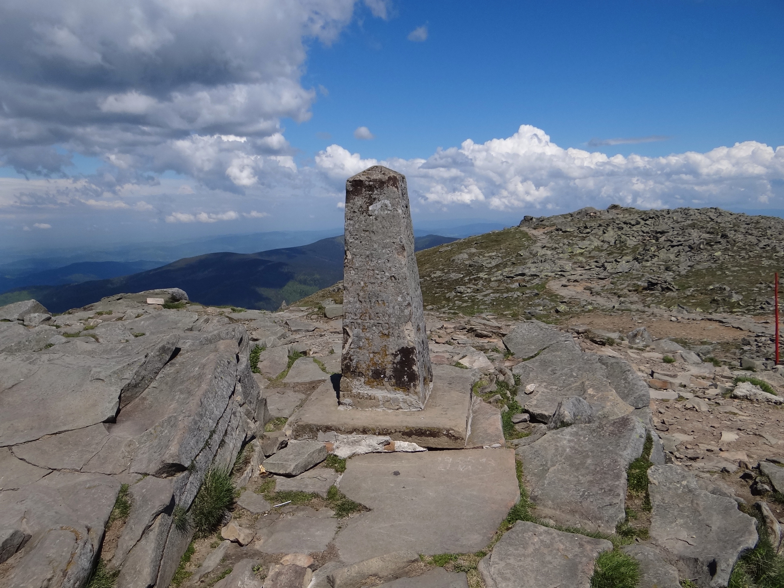 Obelisk na szczycie Babiej Gory